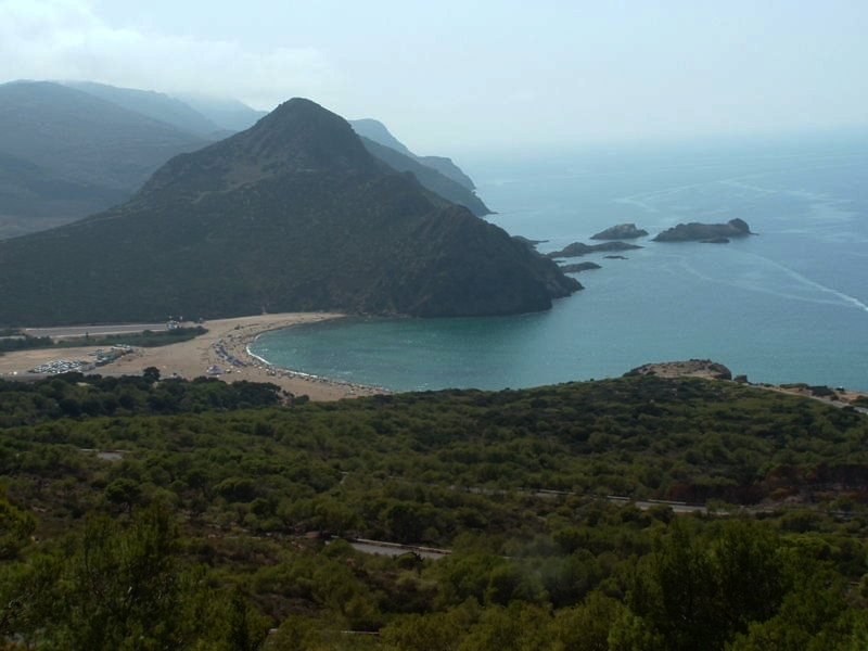 Madagh beach in Oran, Algeria